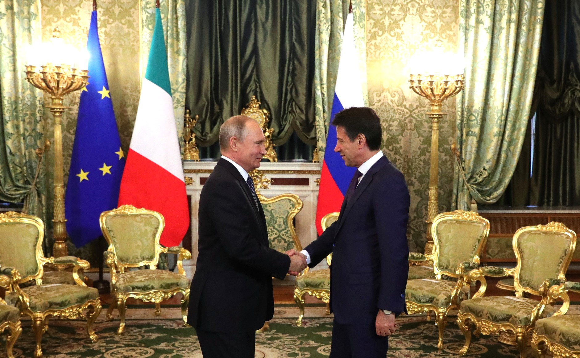 Президент России Владимир Путин с Председателем Совета министров Итальянской Республики Джузеппе Конте